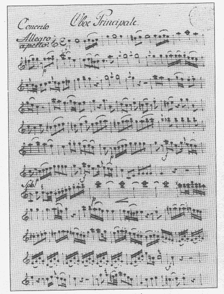 Partitura del Concierto para Oboe de Mozart. Edición de 1920